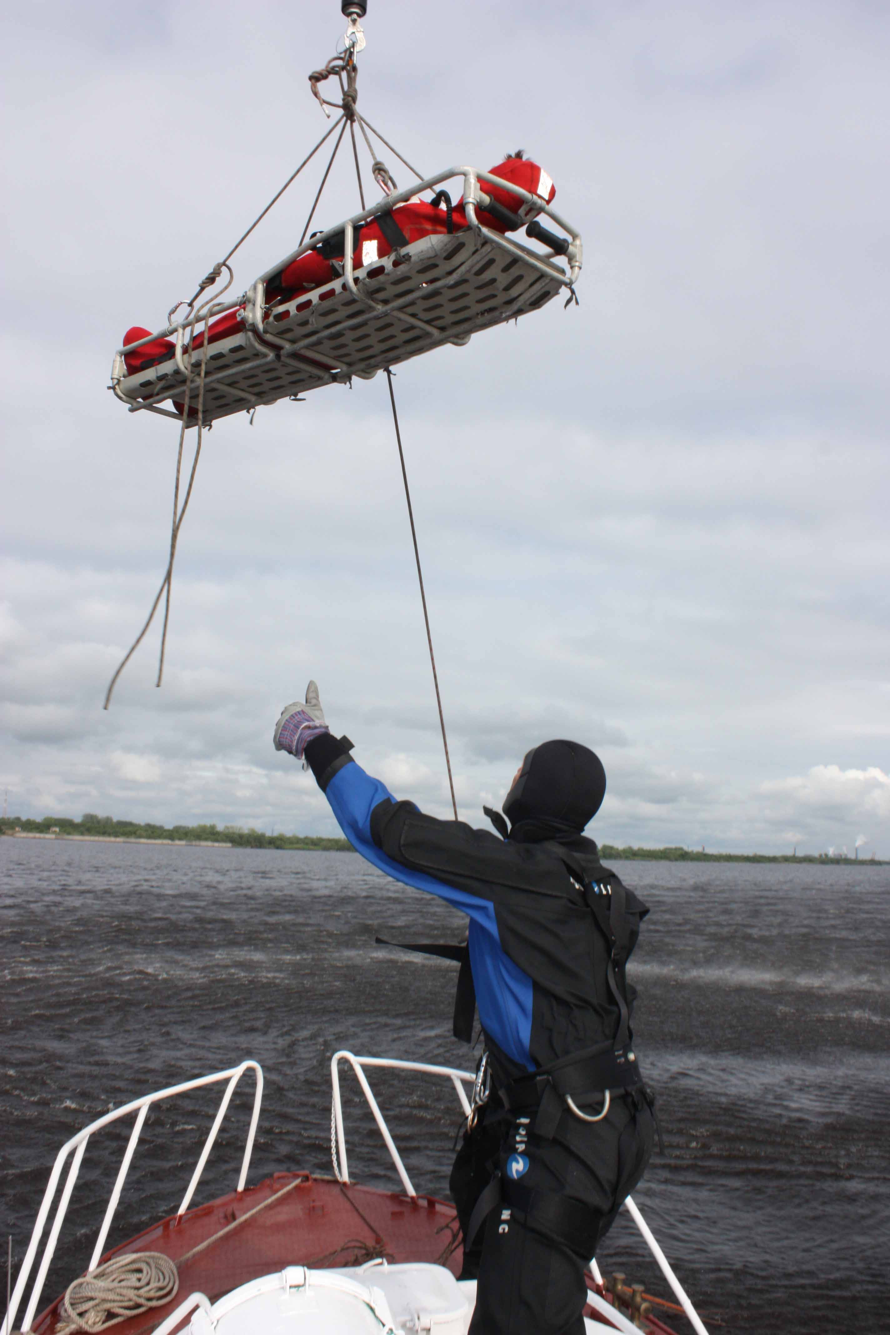 Тренировка пловцов-спасателей. Подъем пострадавшего на носилках на борт вертолета